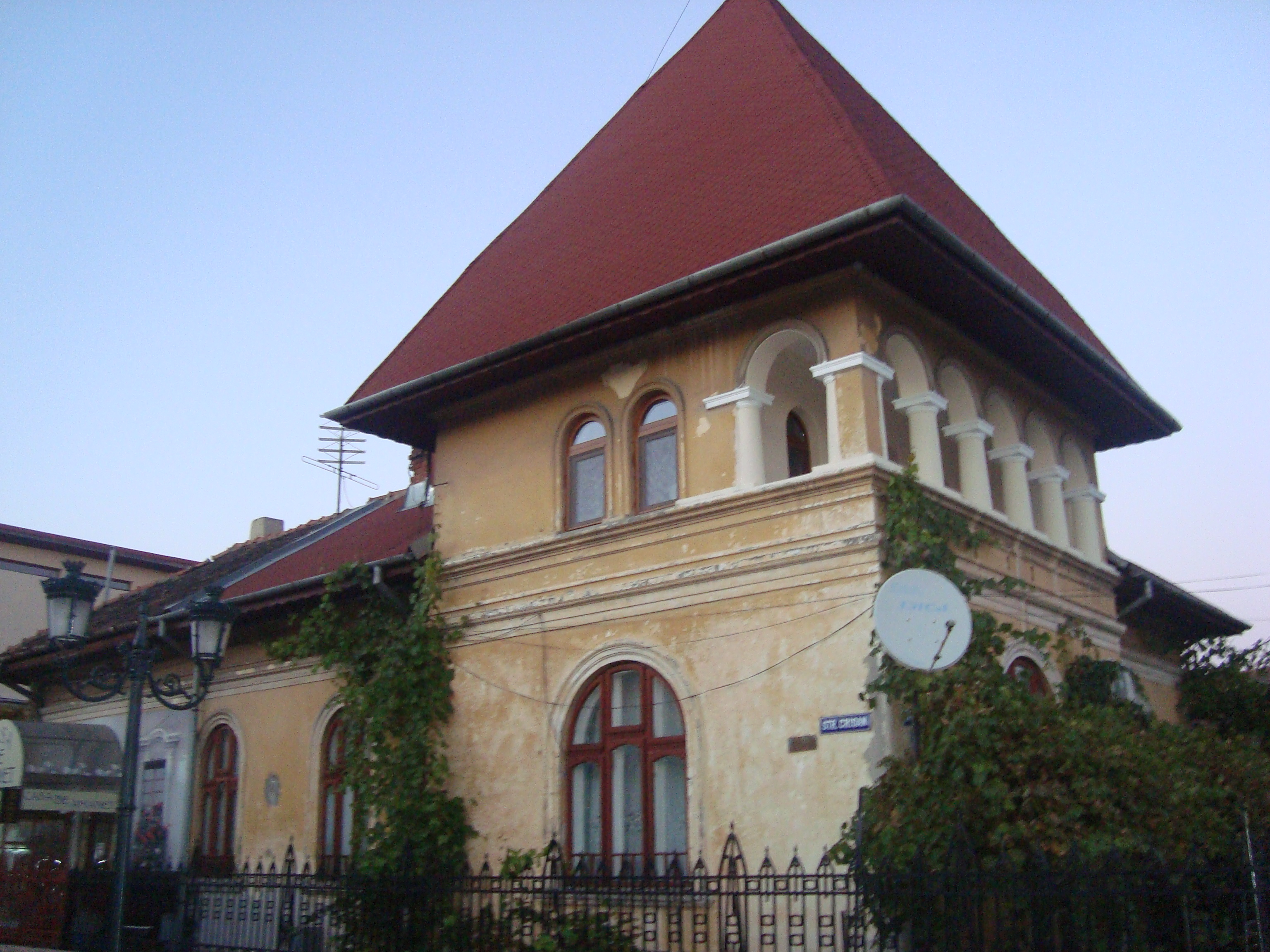 Casa Balu, Tatucu Sever